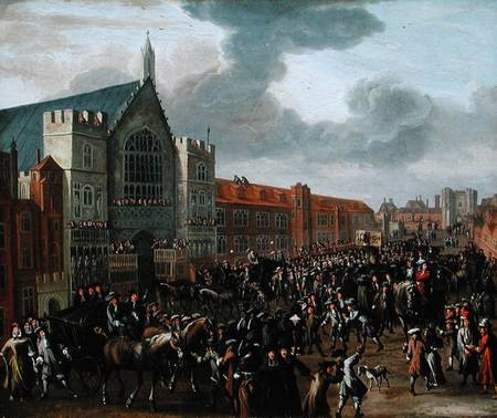 Titus Oates (1649-1704)